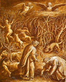 Divina Commedia, Inferno, Canto XV